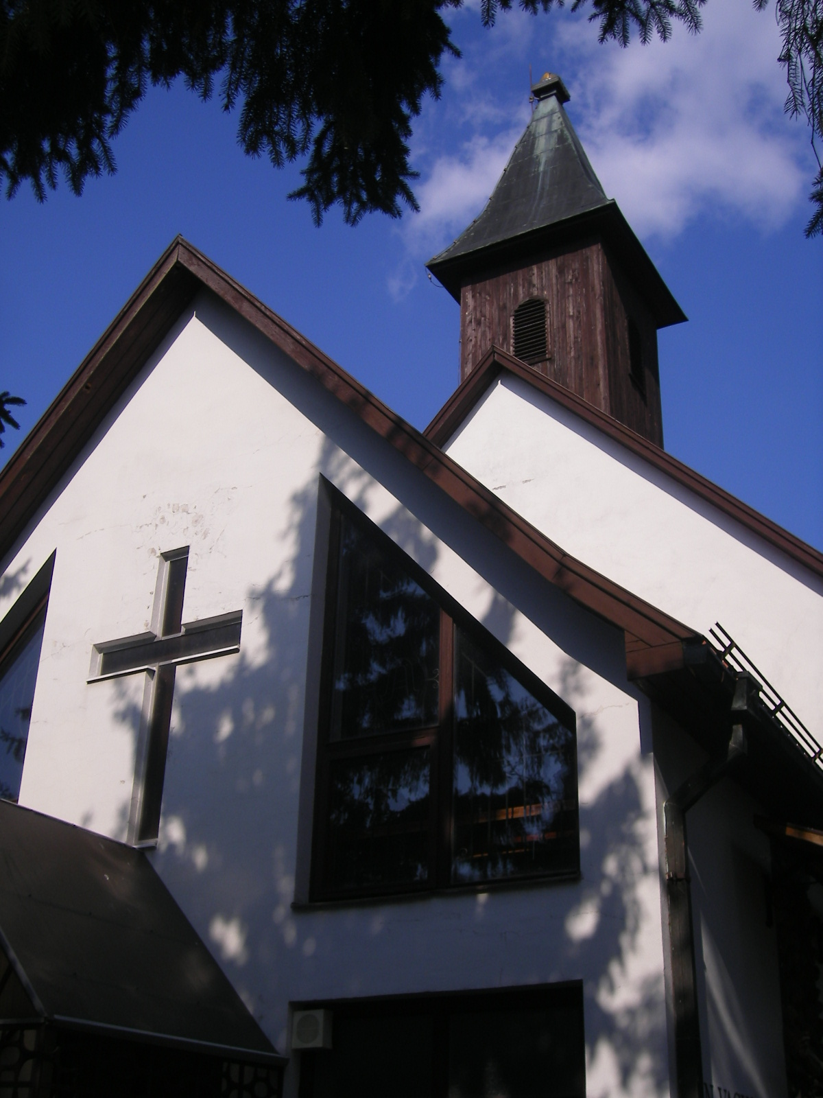 Ipolybalog - Szent Miklós-templom This medium shows the protected monument with the number 610-422/1 in the Slovak Republic.